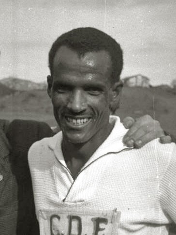 Título original: El etiope Mamo Wolde 'Gacela Negra' en el cross de Elgoibar (2/2) Localización: Elgóibar (Guipúzcoa)